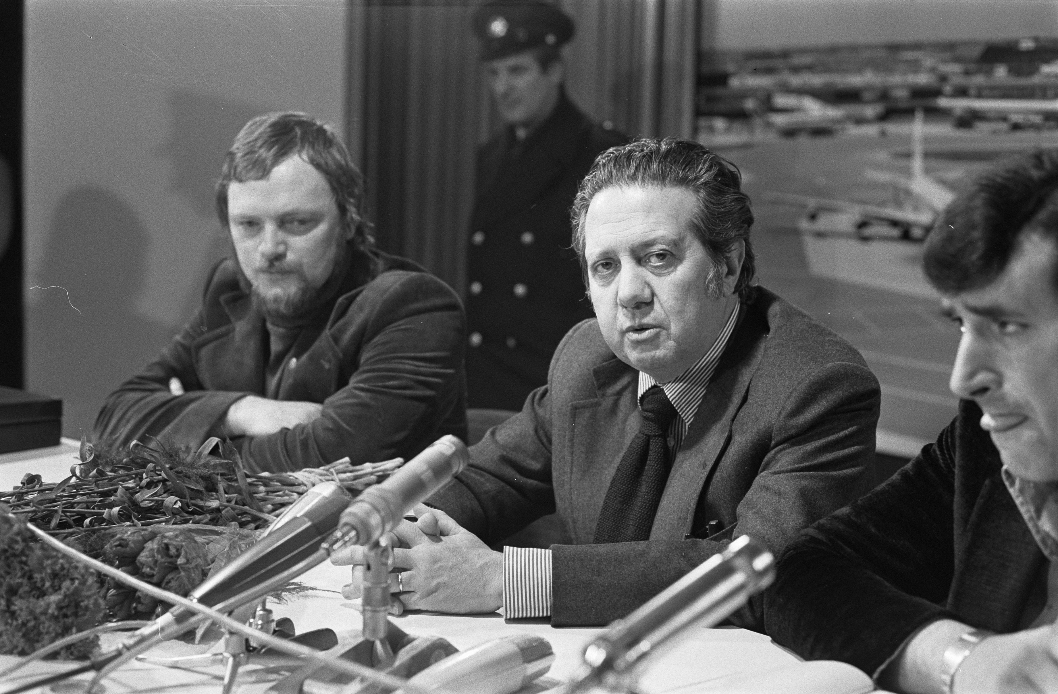 Collectie / Archief : Fotocollectie Anefo Reportage / Serie : [ onbekend ] Beschrijving : Portugese minister Soares (voorzitter Socialistische Partij) op Schiphol aangekomen; Mario Soares (r) tijdens persconferentie Datum : 24 januari 1975 Locatie : Noord-Holland, Schiphol Trefwoorden : ministers, persconferenties Persoonsnaam : Soares, Mario Fotograaf : Peters, Hans / Anefo Auteursrechthebbende : Nationaal Archief Materiaalsoort : Negatief (zwart/wit) Nummer archiefinventaris : bekijk toegang 2.24.01.05 Bestanddeelnummer : 927-7110